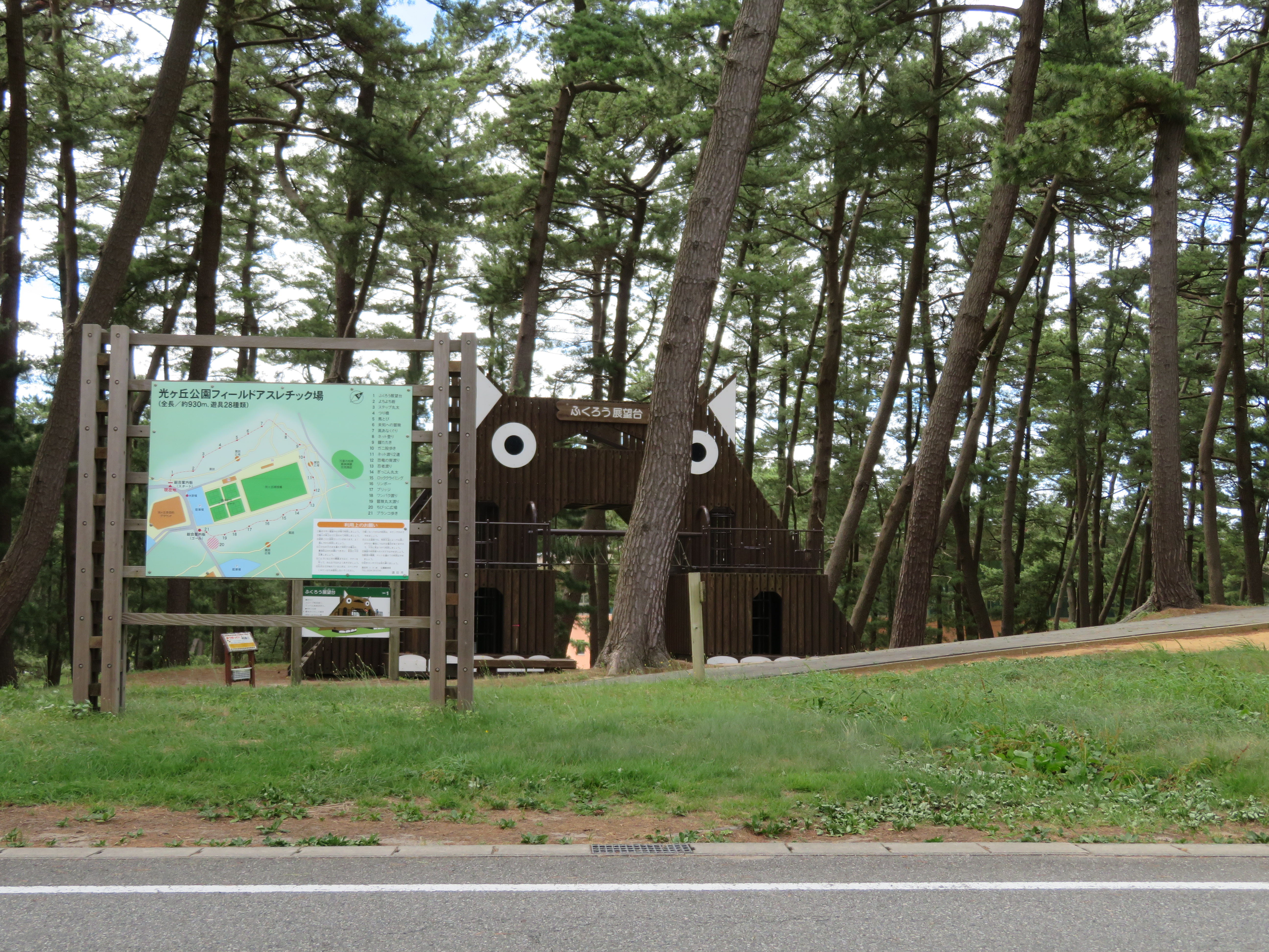 山形県酒田市ある光ヶ丘公園（ふくろう展望台付近） Canon PowerShot SX720 HS